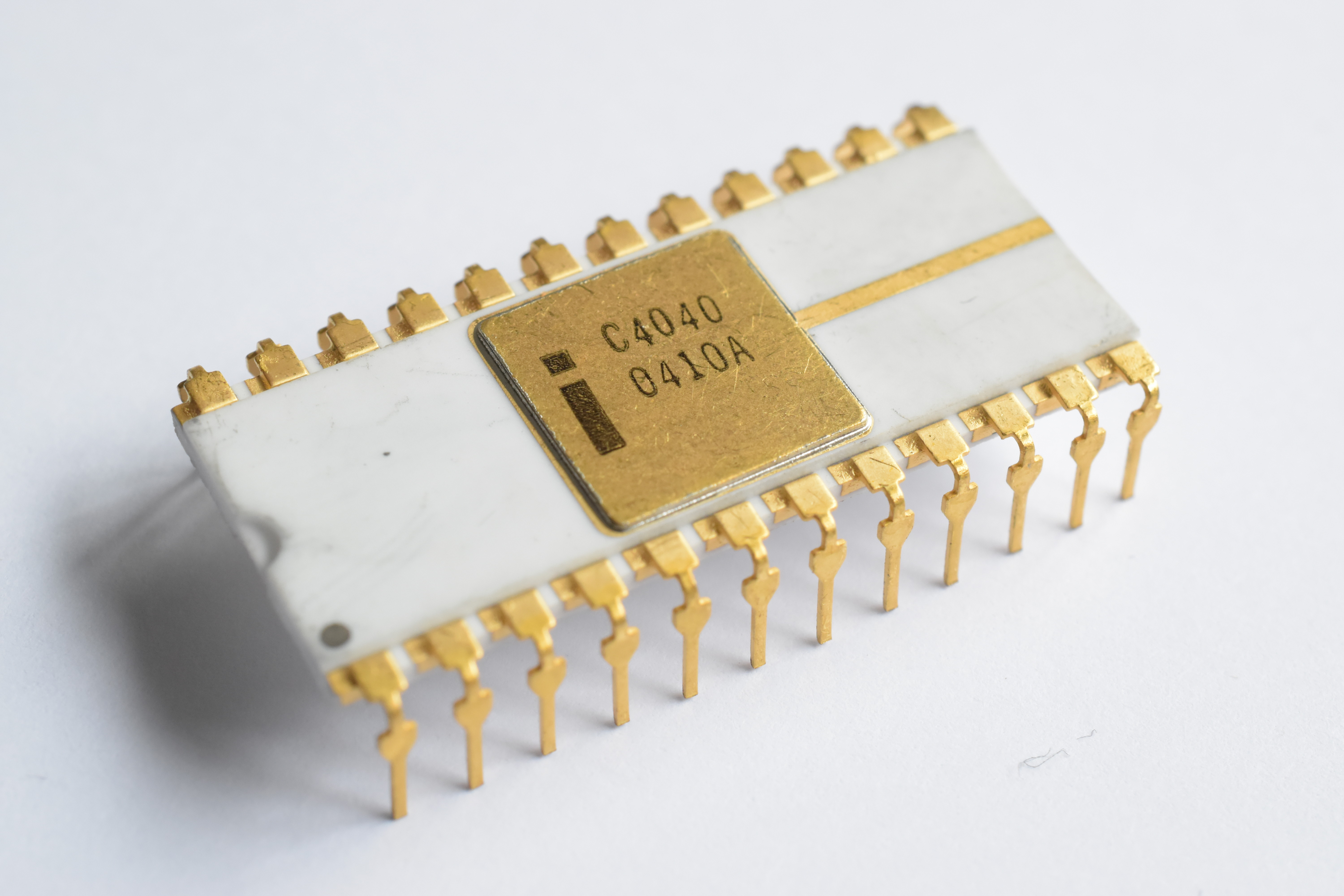 Procesoro Intel C4040.